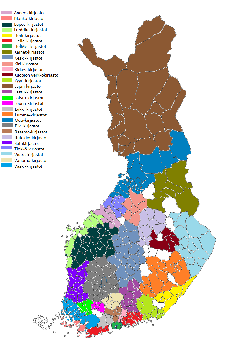 Kartta Suomen kirjastokimpoista.